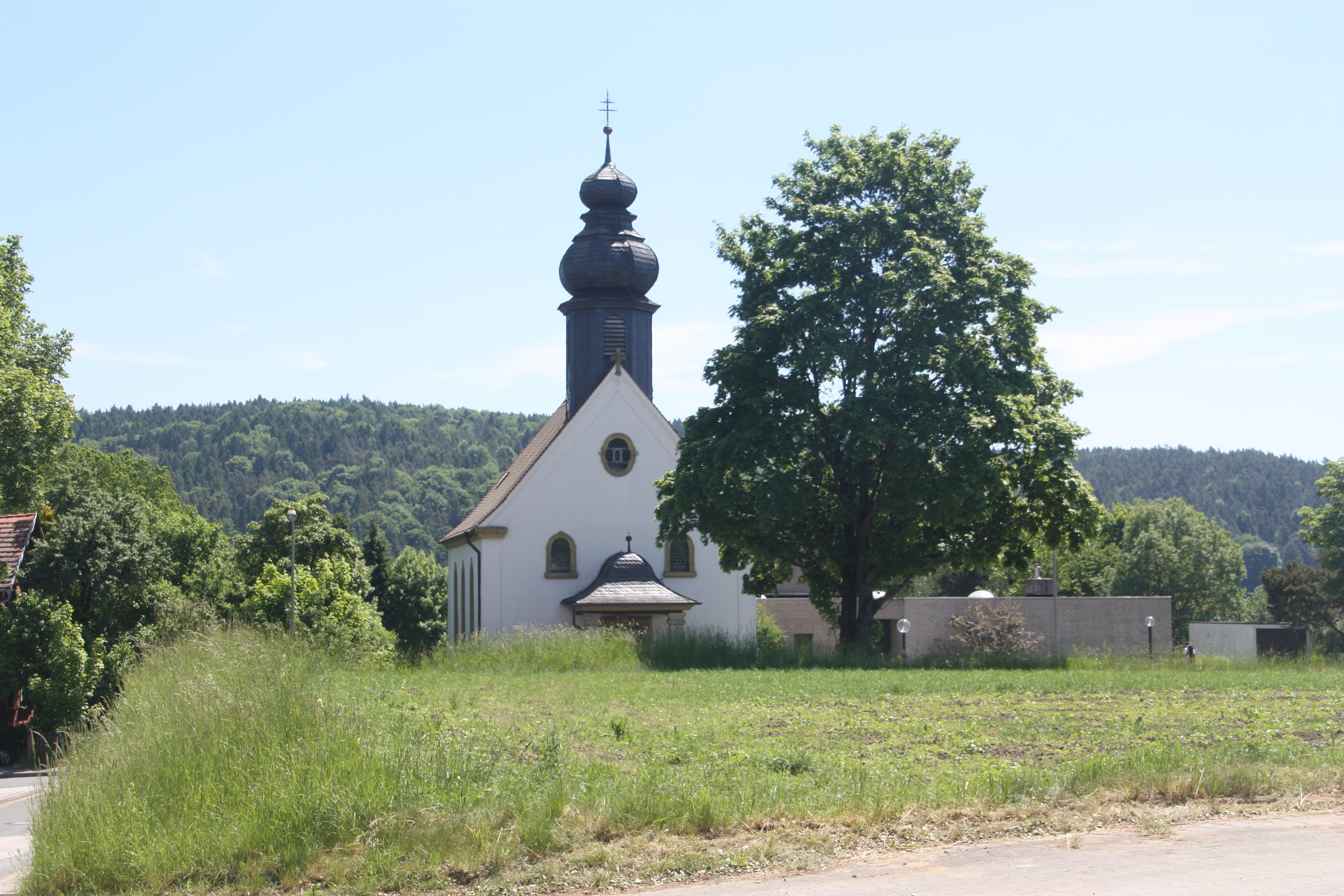 Plankenfels